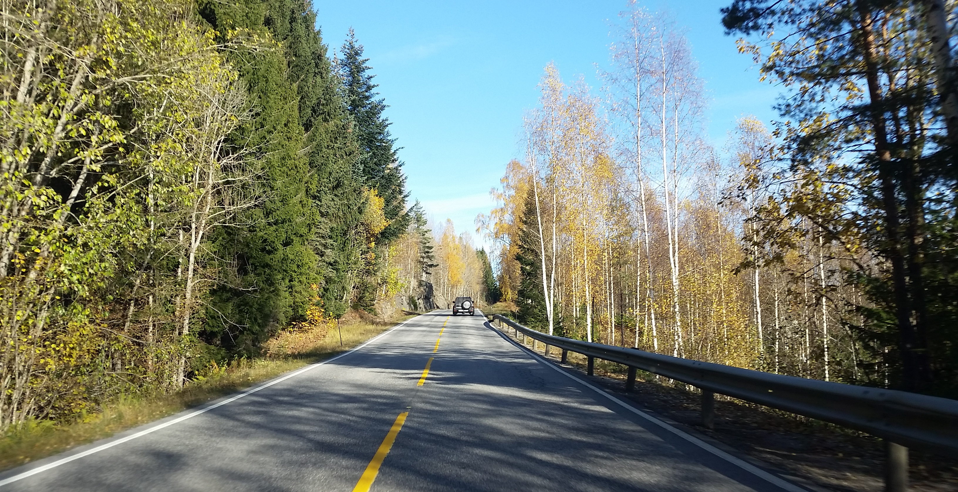 Fylkesvei 356 i Telemark